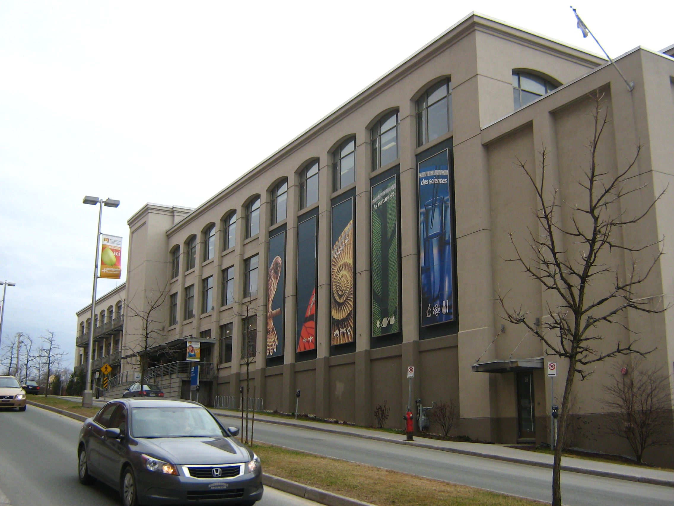 Musée de la nature et des sciences de Sherbrooke